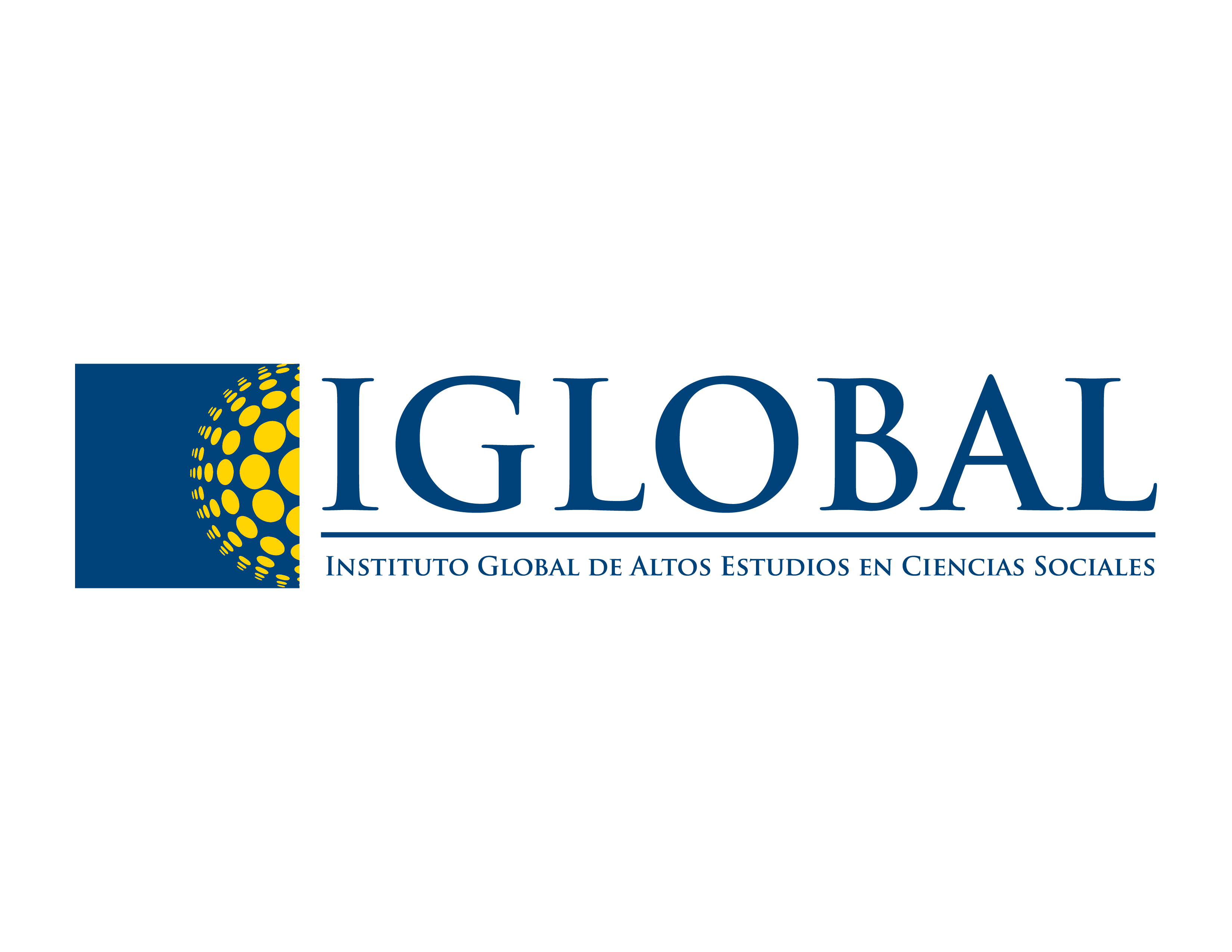 Logo del Instituto Global de Altos Estudios en Ciencias Sociales (IGLOBAL).